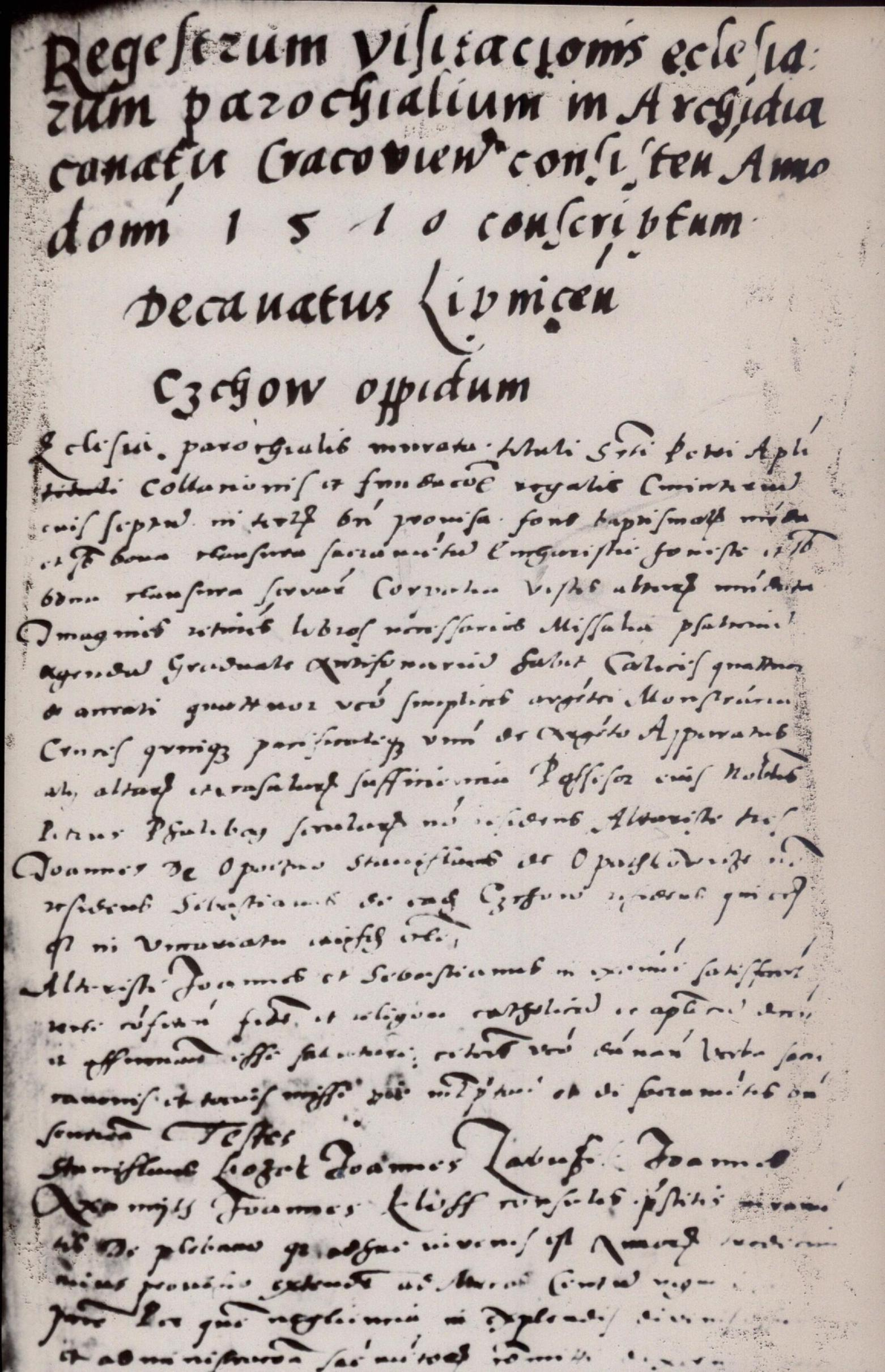 rękopis wizytacji biskupiej Filipa Padniewskiego w Czchowie w 1570 (Biblioteka Seminarium Duchownego w Tarnowie)